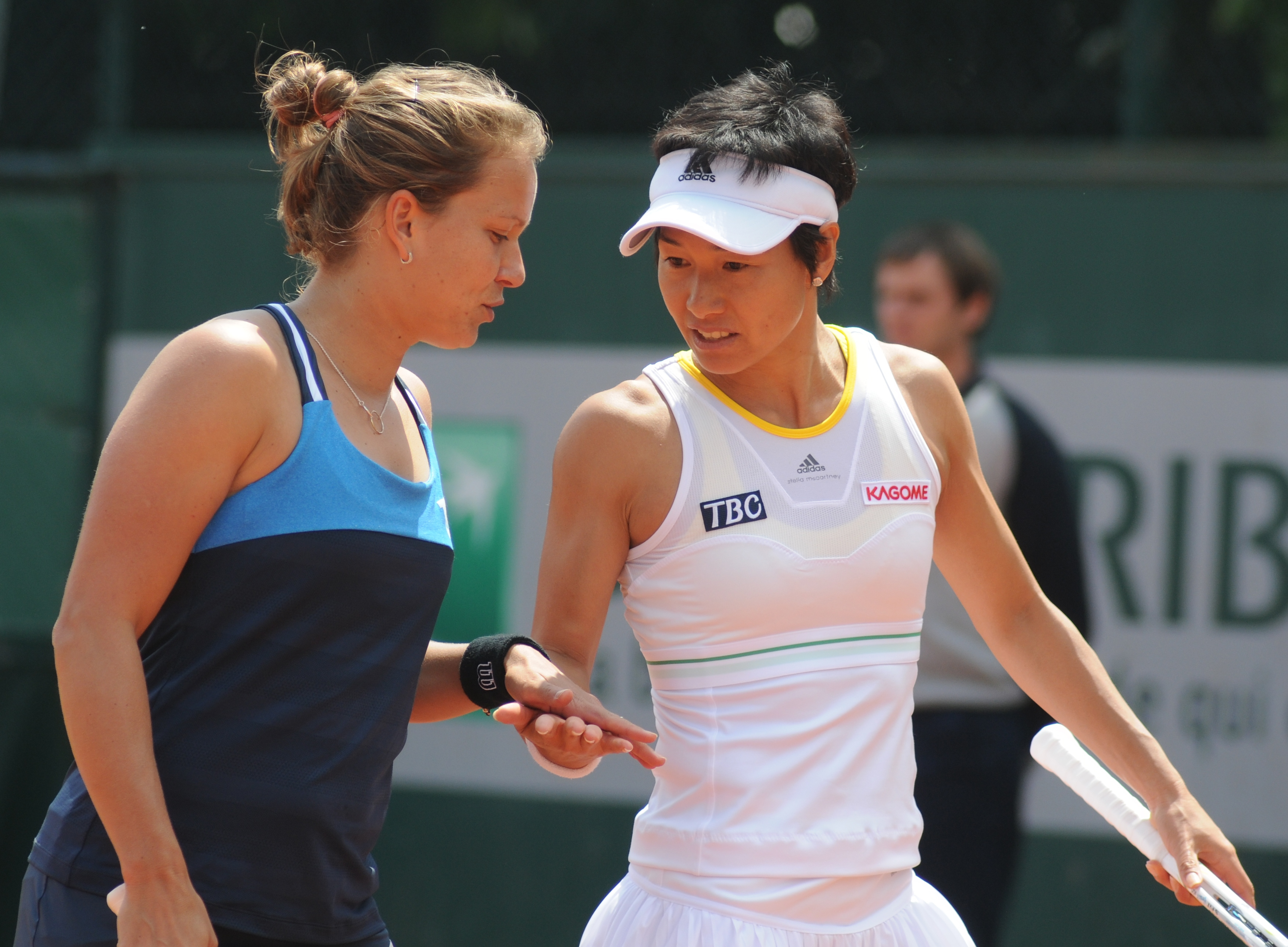 Kimiko Date-Krumm & Barbora Zahlavova Strycova